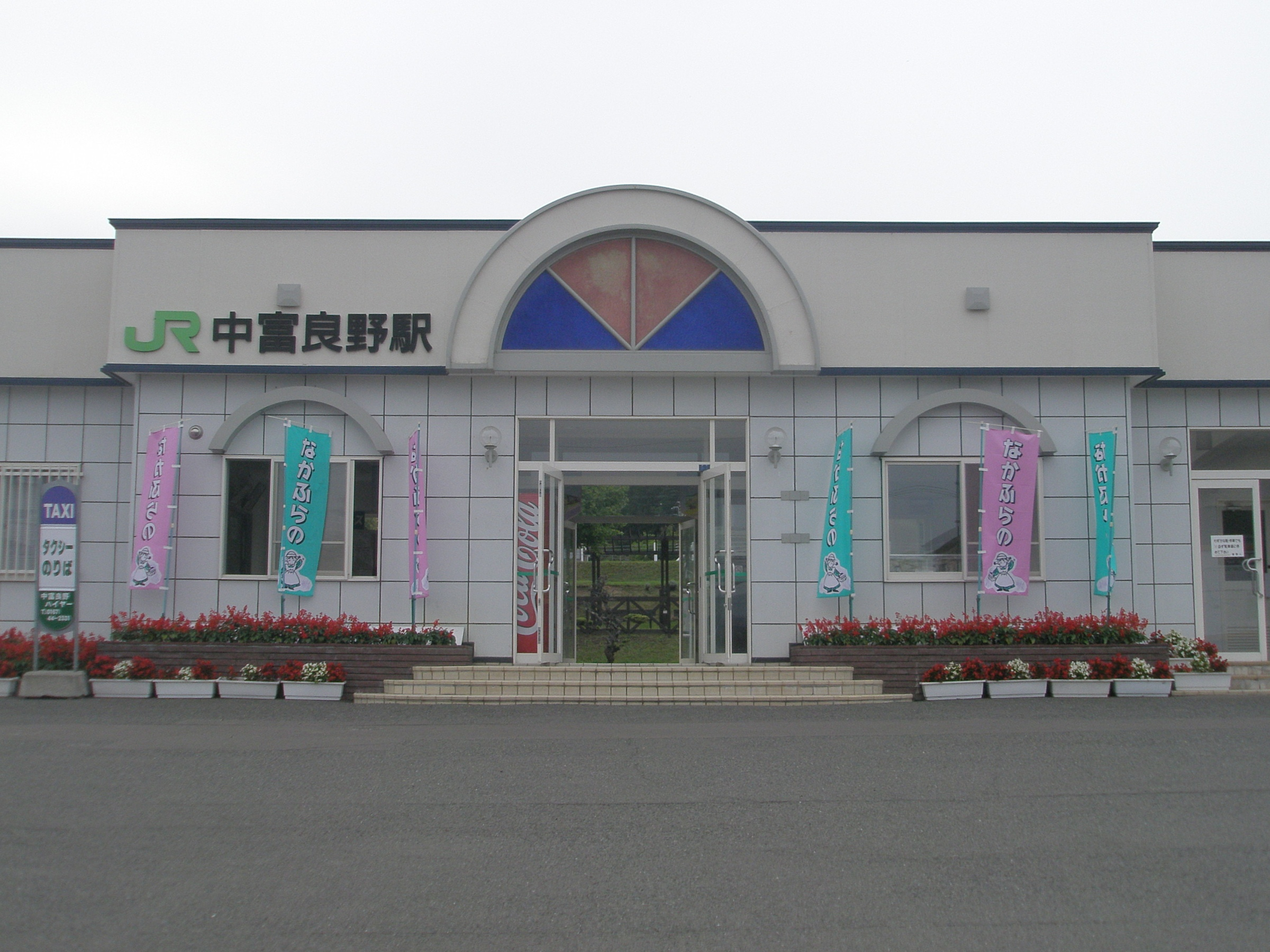 富良野線中富良野駅（空知郡中富良野町）